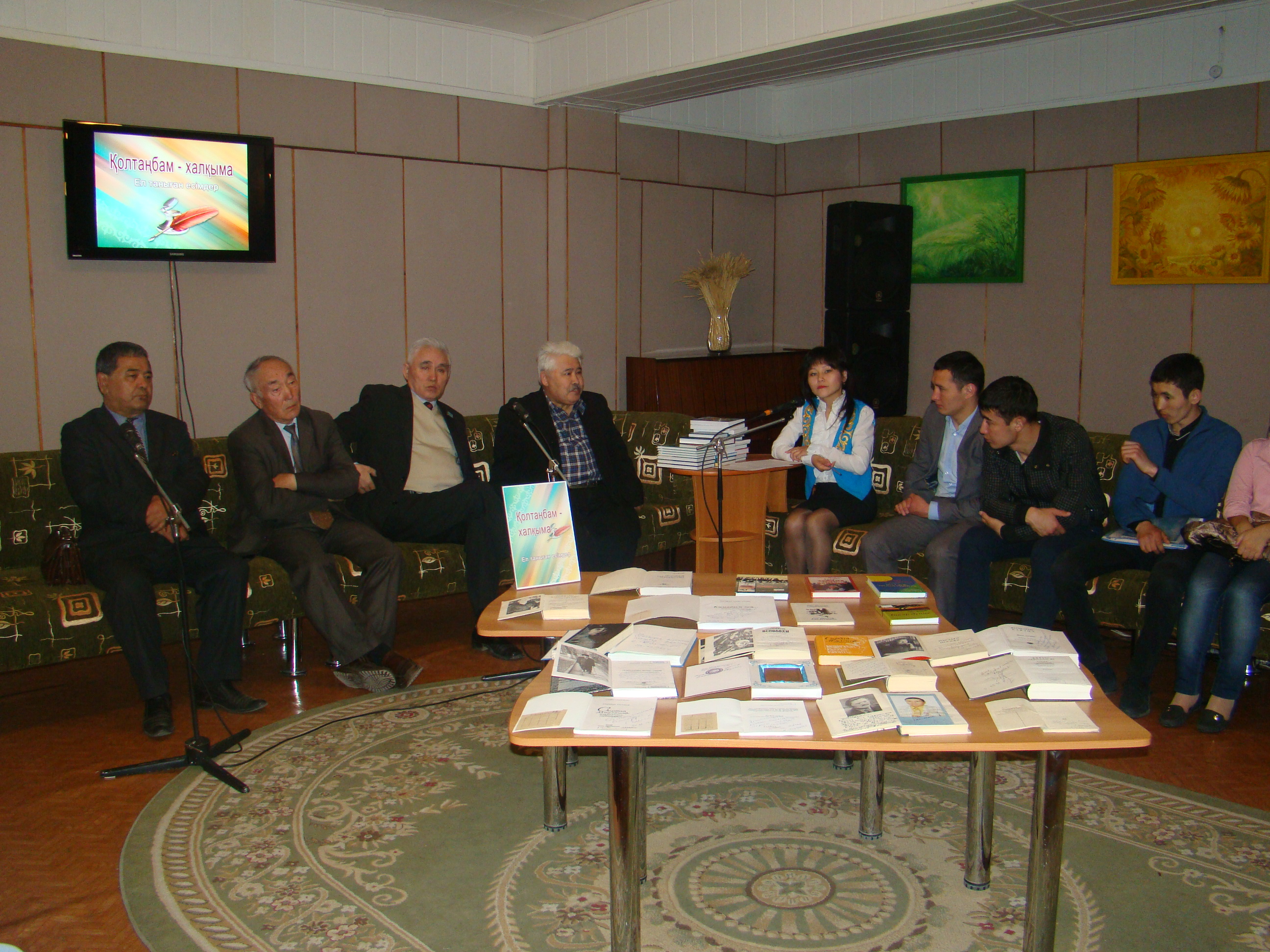 Отдел выставочно-массовой работы (Костанайская областная универсальная научная библиотека им. Л. Н. Толстого)